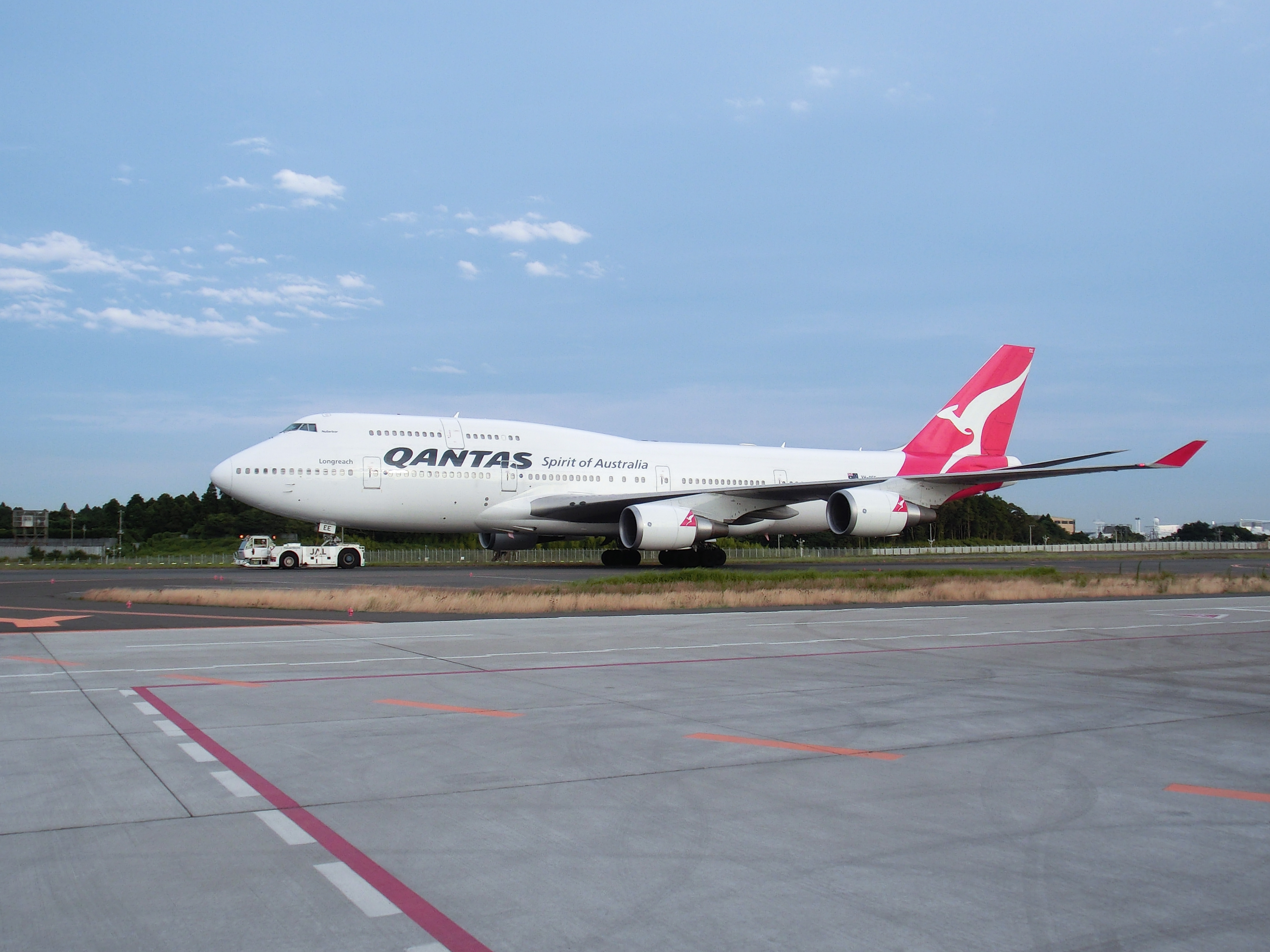 牽引移動中のボーイング747、カンタス航空